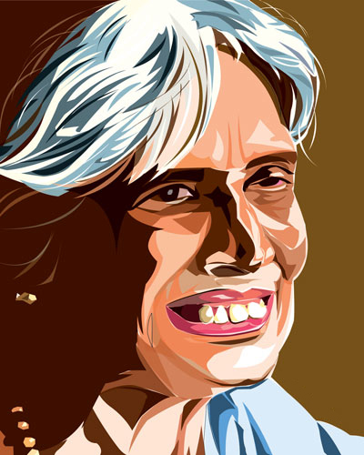 Balamaniamma - ഡിജിറ്റൽ വെക്റ്റർ പോർട്രൈറ്റ്